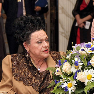 Людмила Зыкина на праздновании своего 80-летия